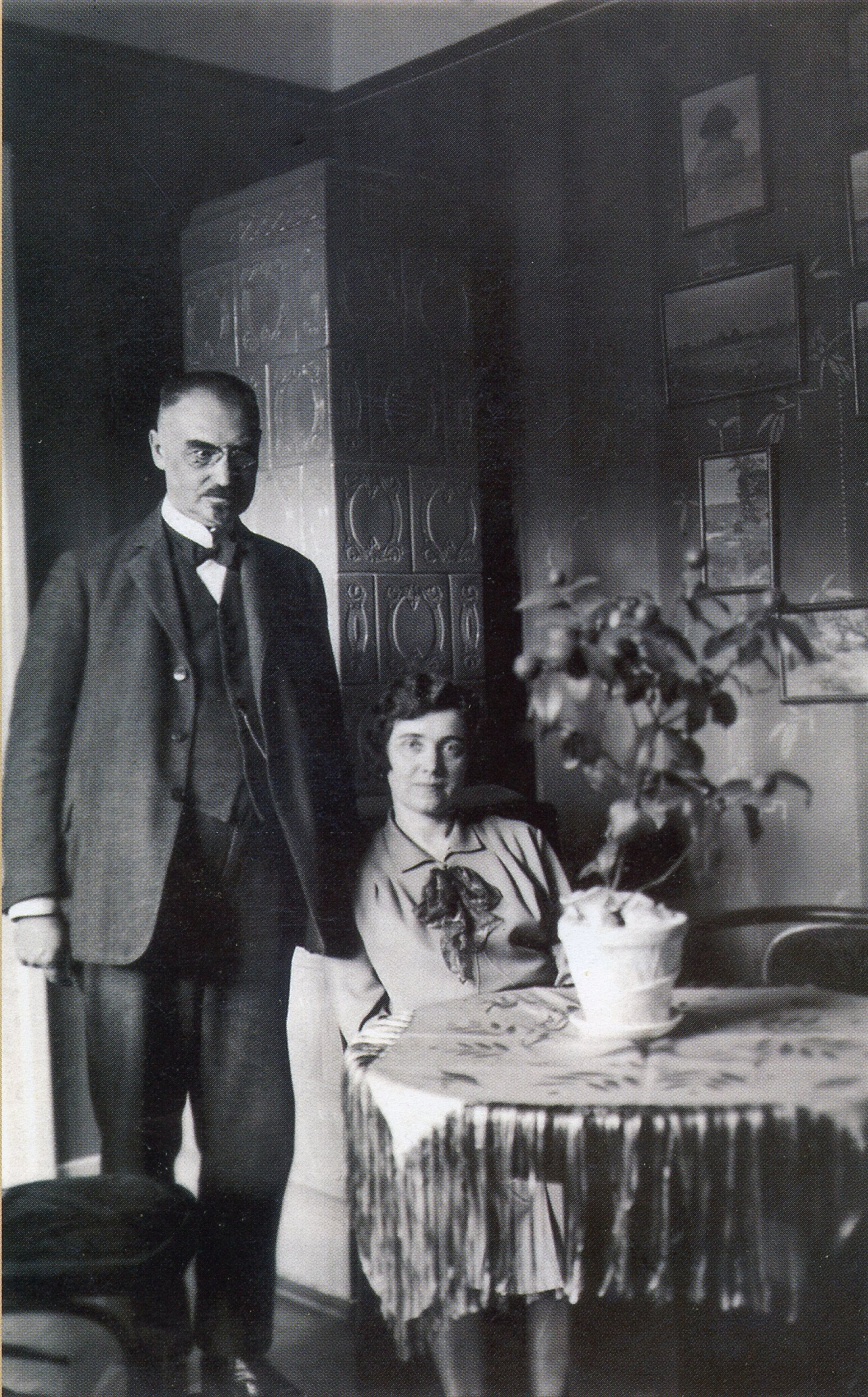 Михайло і Ольга Мочульські 1930-ті рр. За виданням: Листування Михайла, Марії та Катерини Грушевських. – Львів. 2008. – С. 92.